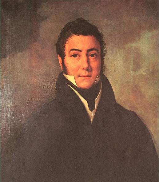 José de San Martin